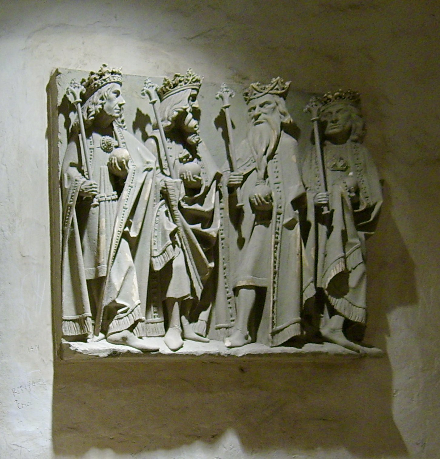 Krypta im Dom zu Speyer